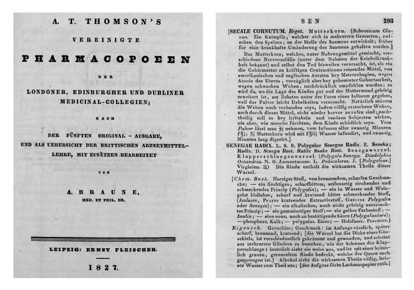 Mutterkorn in einem Arzneibuch 1827